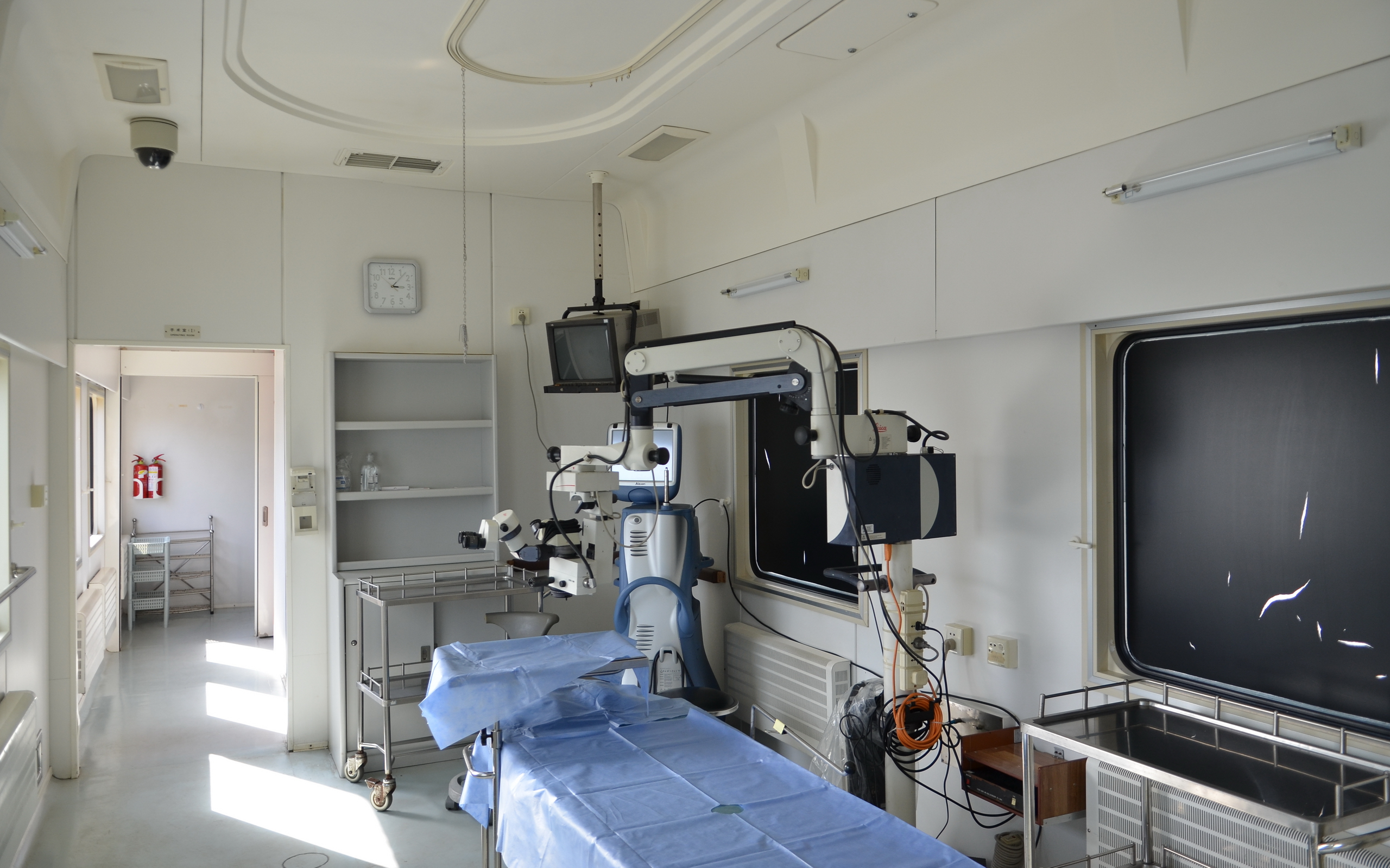 第三列健康快车中第三节手术车内部的手术室